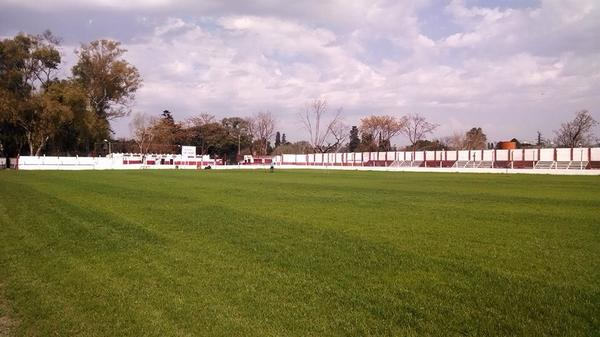 Estadio